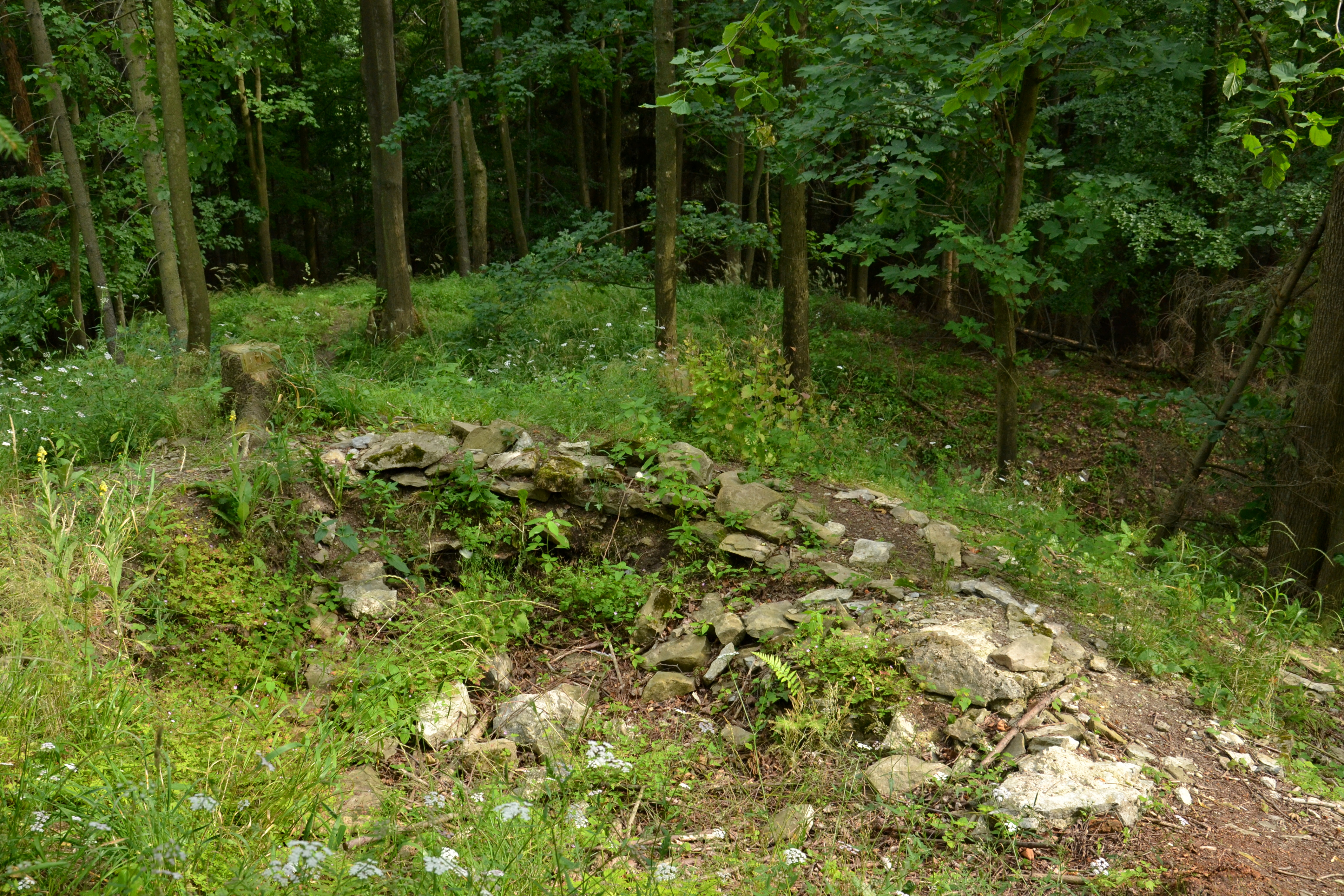 Vlčinec – výkopem odkryté fragmenty zdiva v hradním jádře